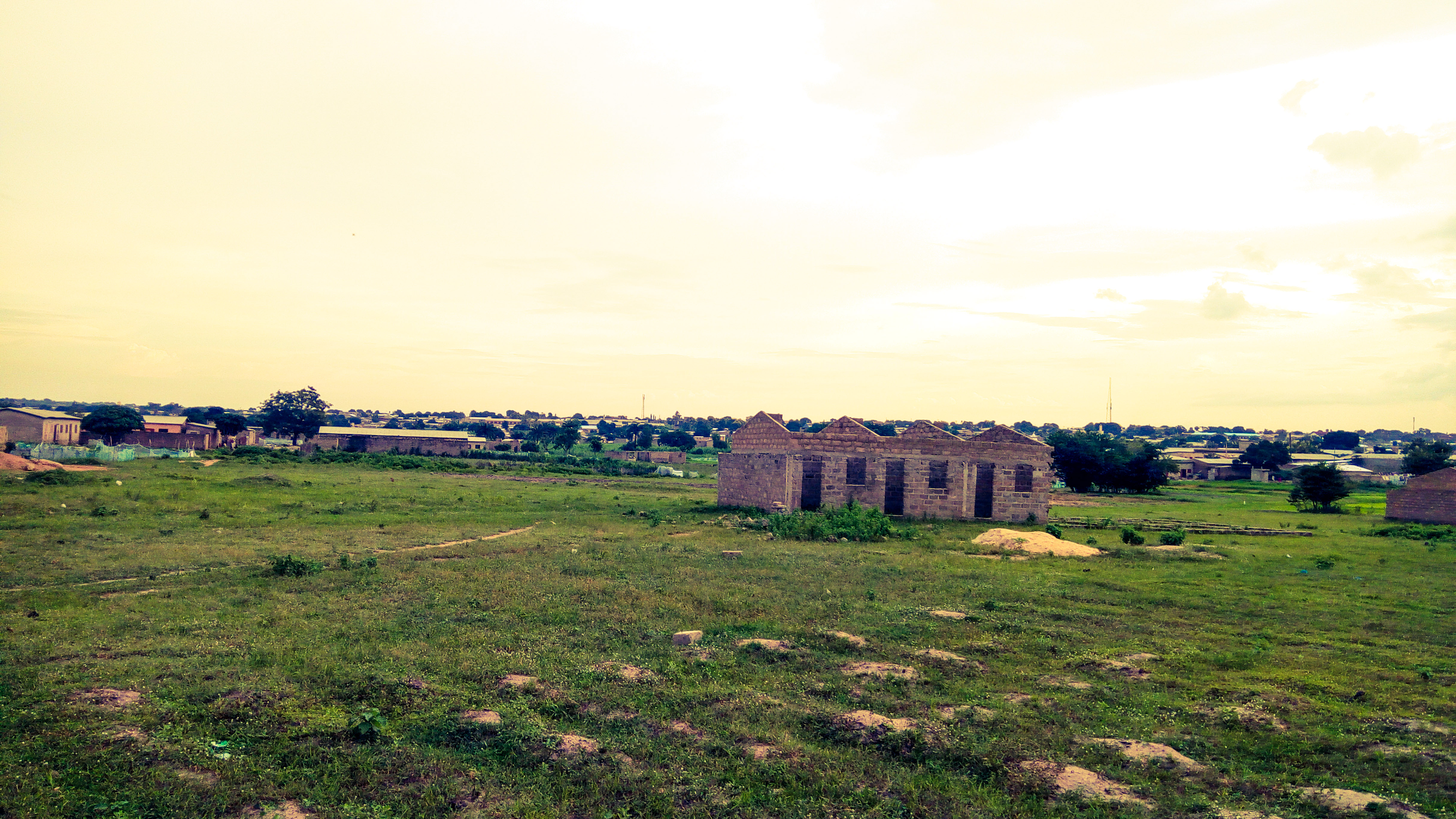 C'est une vue de paysage prise dans un bas-fonds au couché du soleil dans la ville de Parakou au quartier Baka.